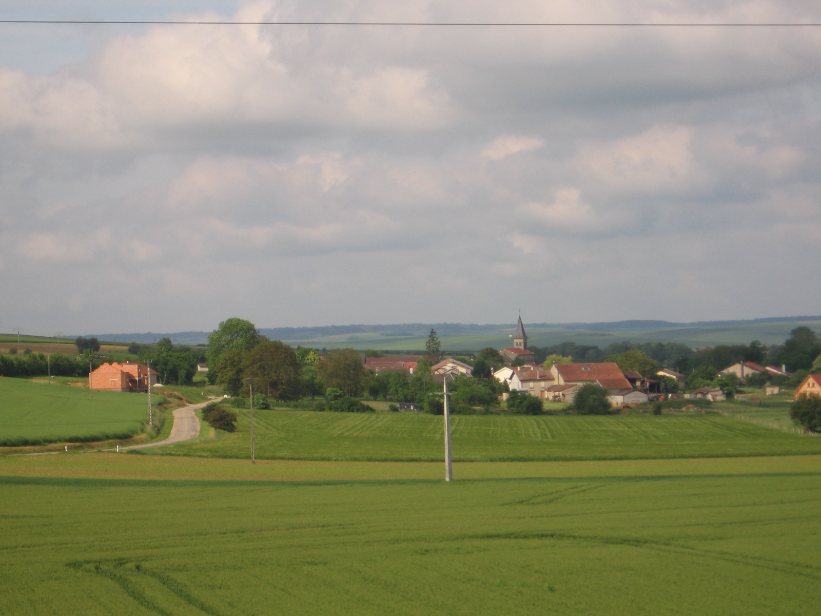 Neuville